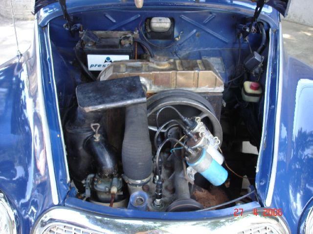 Camioneta DKW-Vemag Vemaguet ano de fabricação 1964. Motor dianteiro, 3 cilindros, uma bobina por cilindro, ciclo de 2 tempos (precisa misturar óleo a gasolina), refrigeração liquida, partida elétrica. Motor que ao invés de usar buchas, casquilhos ou bronzinas em suas partes móveis, usa rolamentos, proporcionando assim uma durabilidade acima do comum para os carros da época.